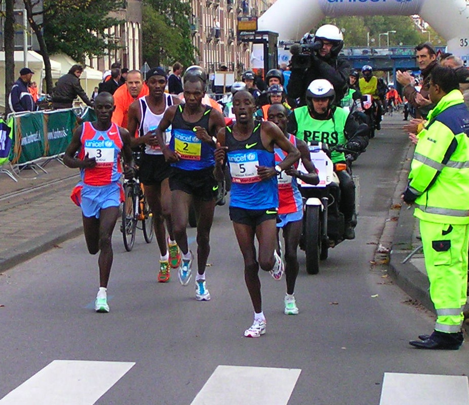 Marathon van Amsterdam 2008, de kopgroep na 35 km. Van links naar rechts: winnaar Paul Kirui, Dejene Berhanu, Robert Cheboror (werd derde), Jackson Koech, en Paul Kosgei.